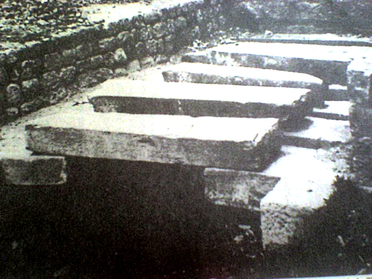 Río Saphy canalizado a modo de túnel por la parte quye atravesaba la Plaza de armas de Cusco